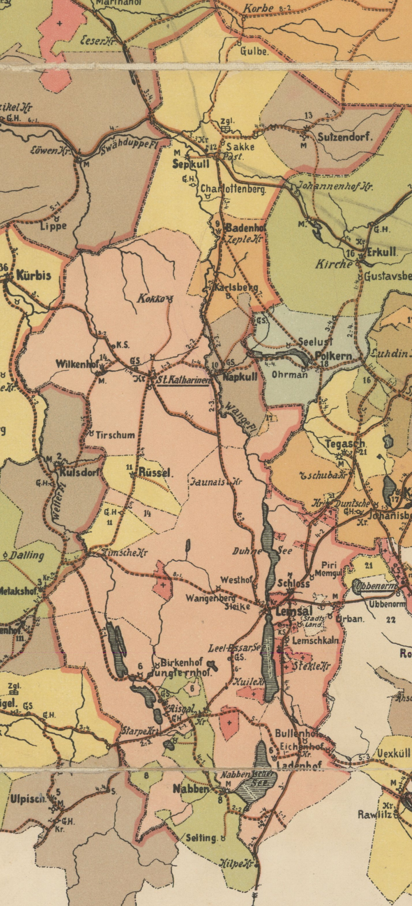 Lemsalu kihelkonna mõisad 1903. aastal.